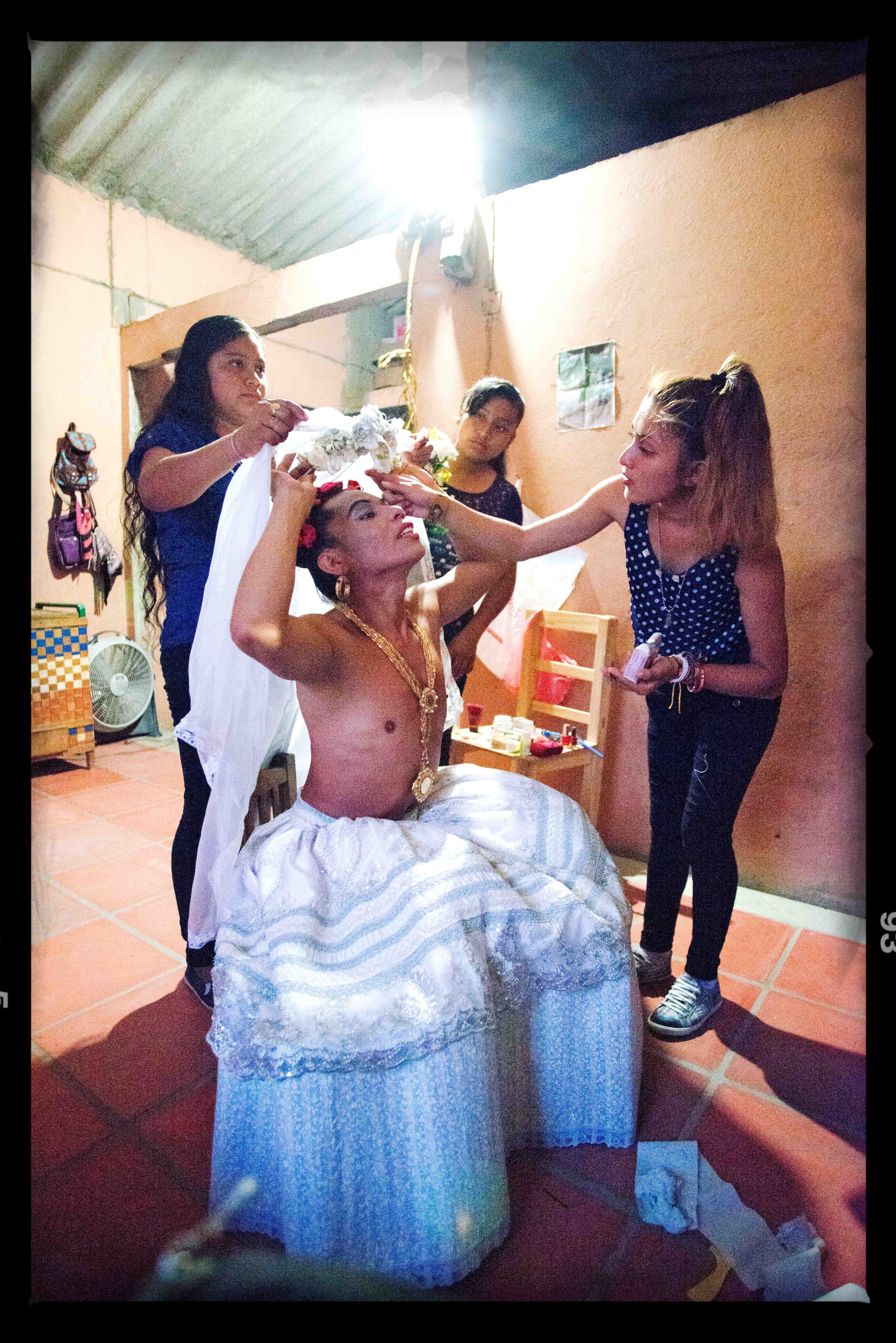 Vorbereitung zu Requiem für einen Acaraván.